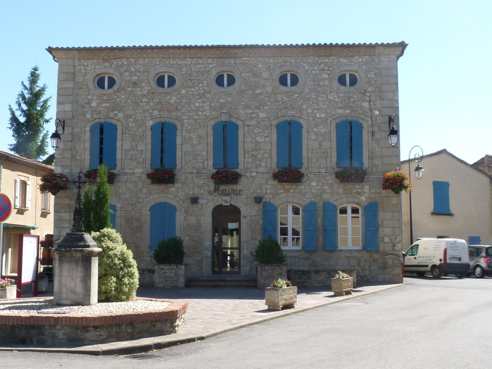 Mairie d'Auriac-sur-Vendinelle, Haute-Garonne, France